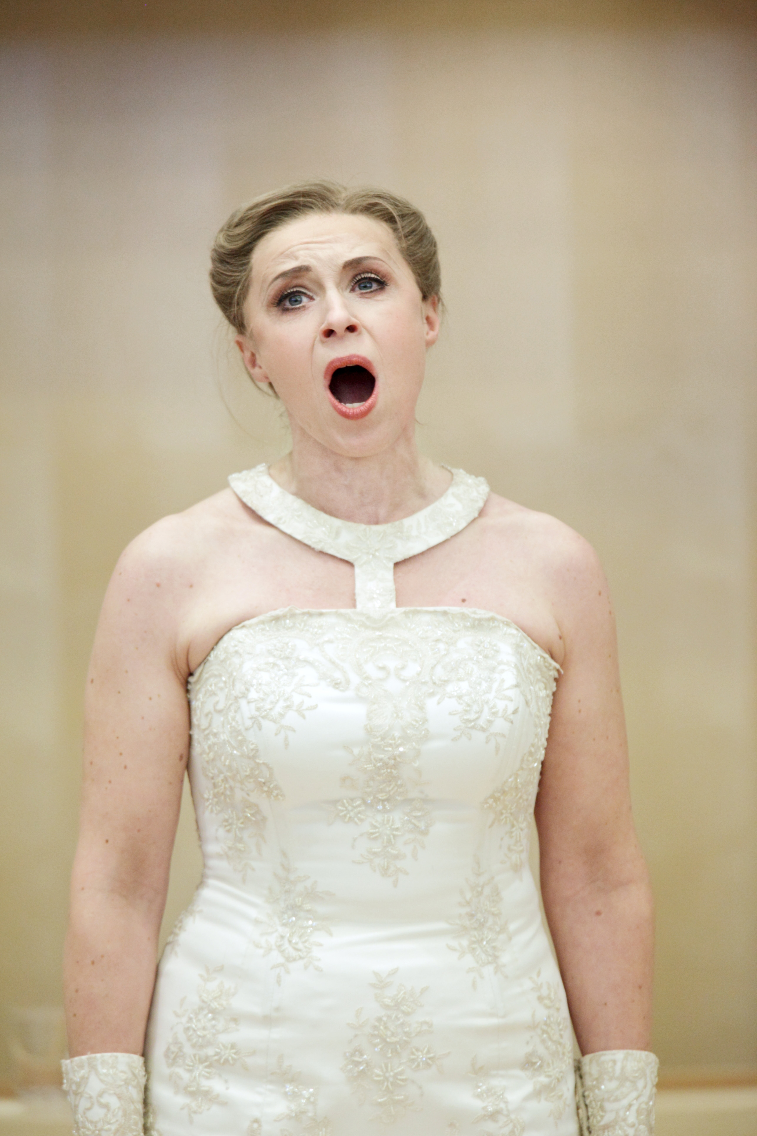 Öppning av Nordiska rådets session i Stockholm 2009. Ann-Christine Larsson som Leïla i Pärlfiskarna.